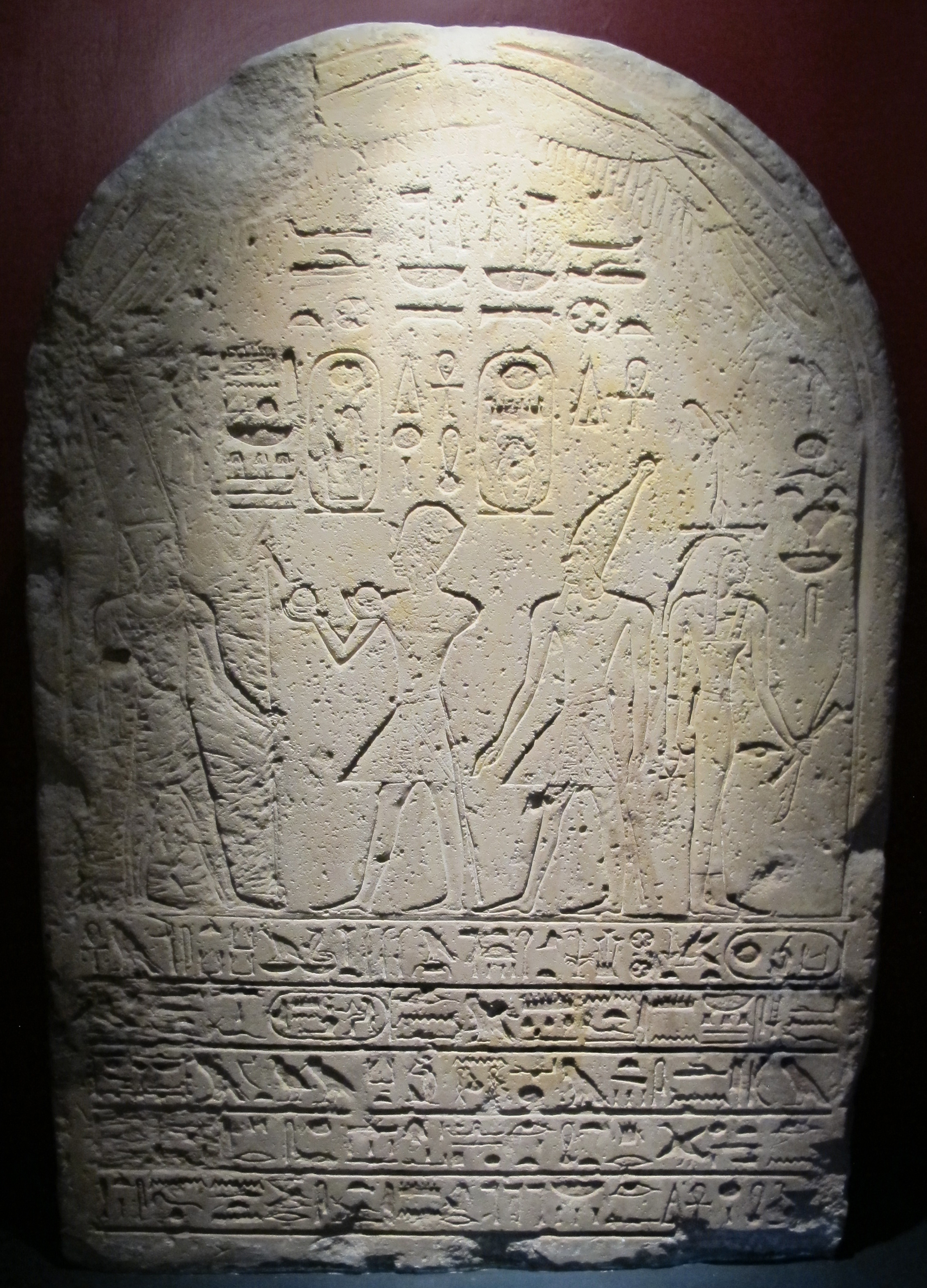 Museo Gregoriano Egizio